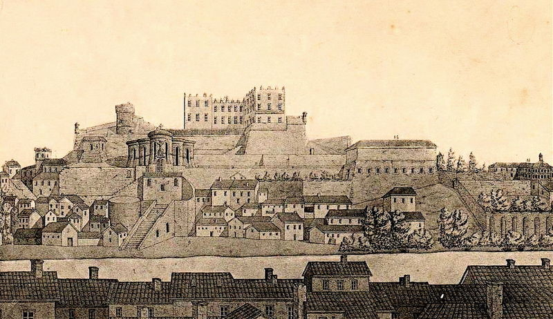 Saint-Chamond (Loire), château des seigneurs et église collégiale, sur la colline Saint-Ennemond, gravure 1644.